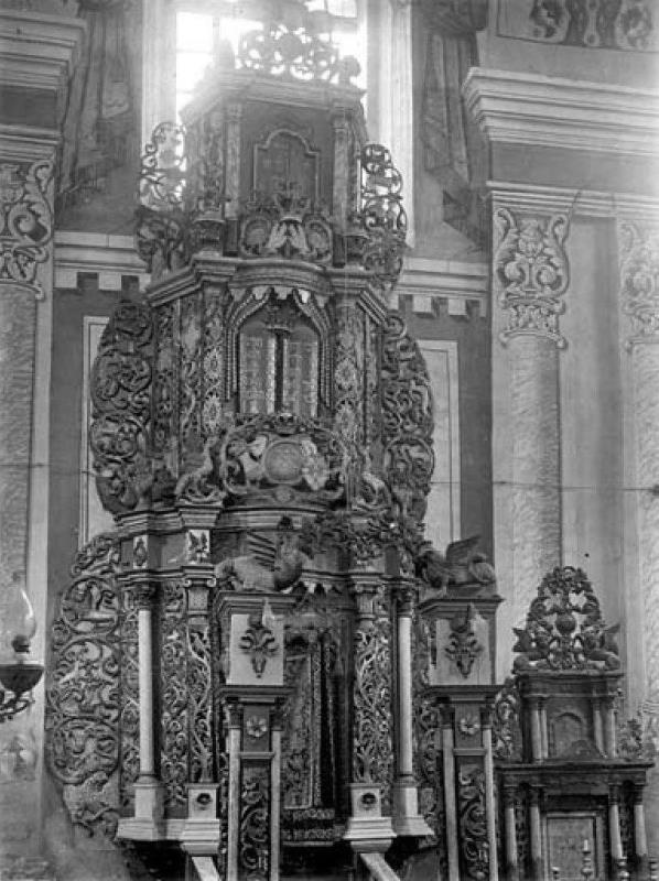 Интерьер синагоги 18 века в Баре, Винницкая область.